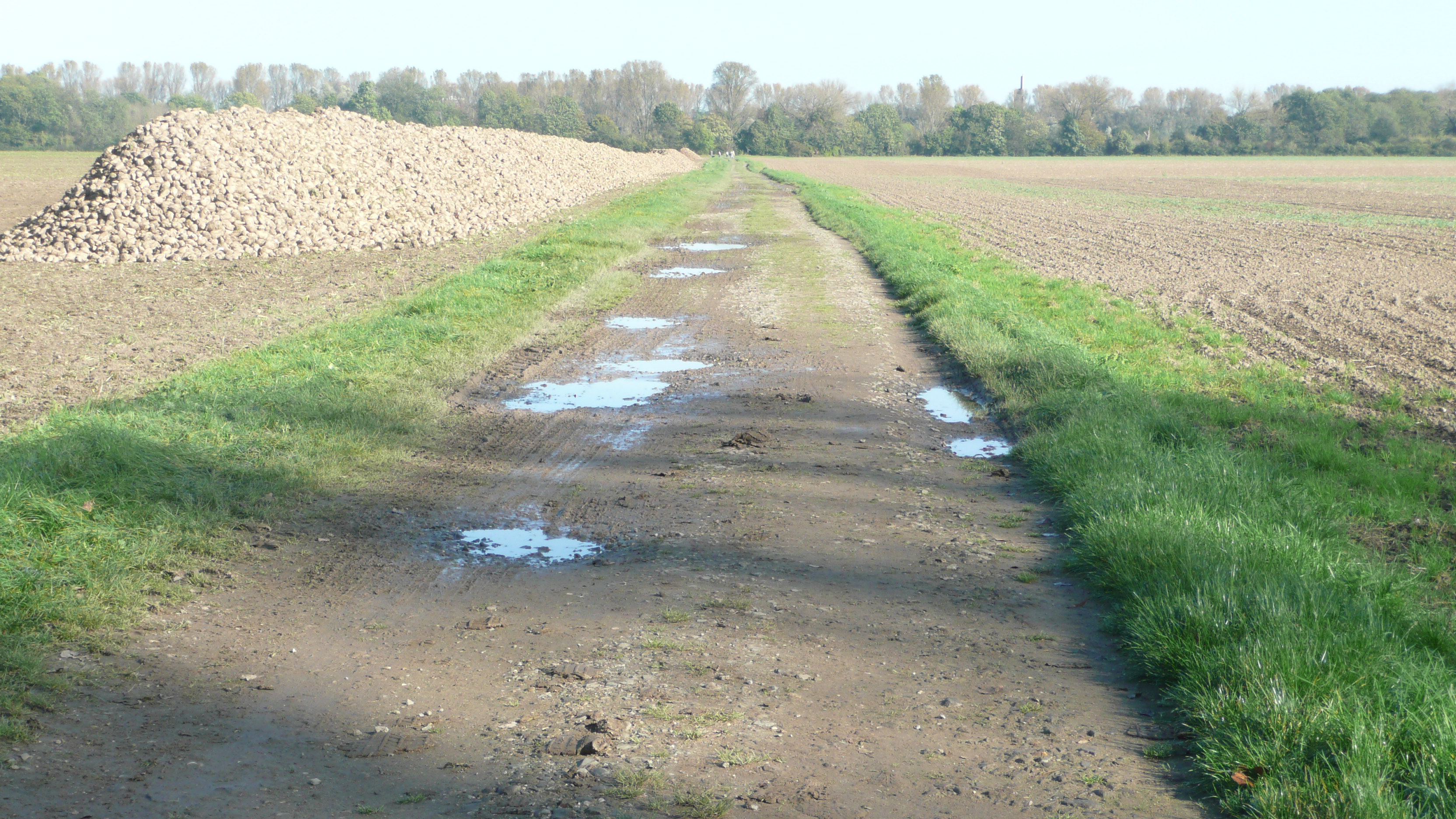 Alte Kölnische Landstraße Trasse 3, Haus Bürgel - Haus Horst